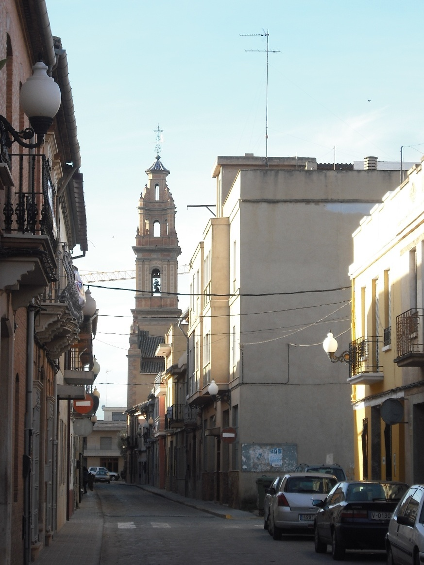 Iglesia de Bonrepós y Mirambell desde el carrer Major.